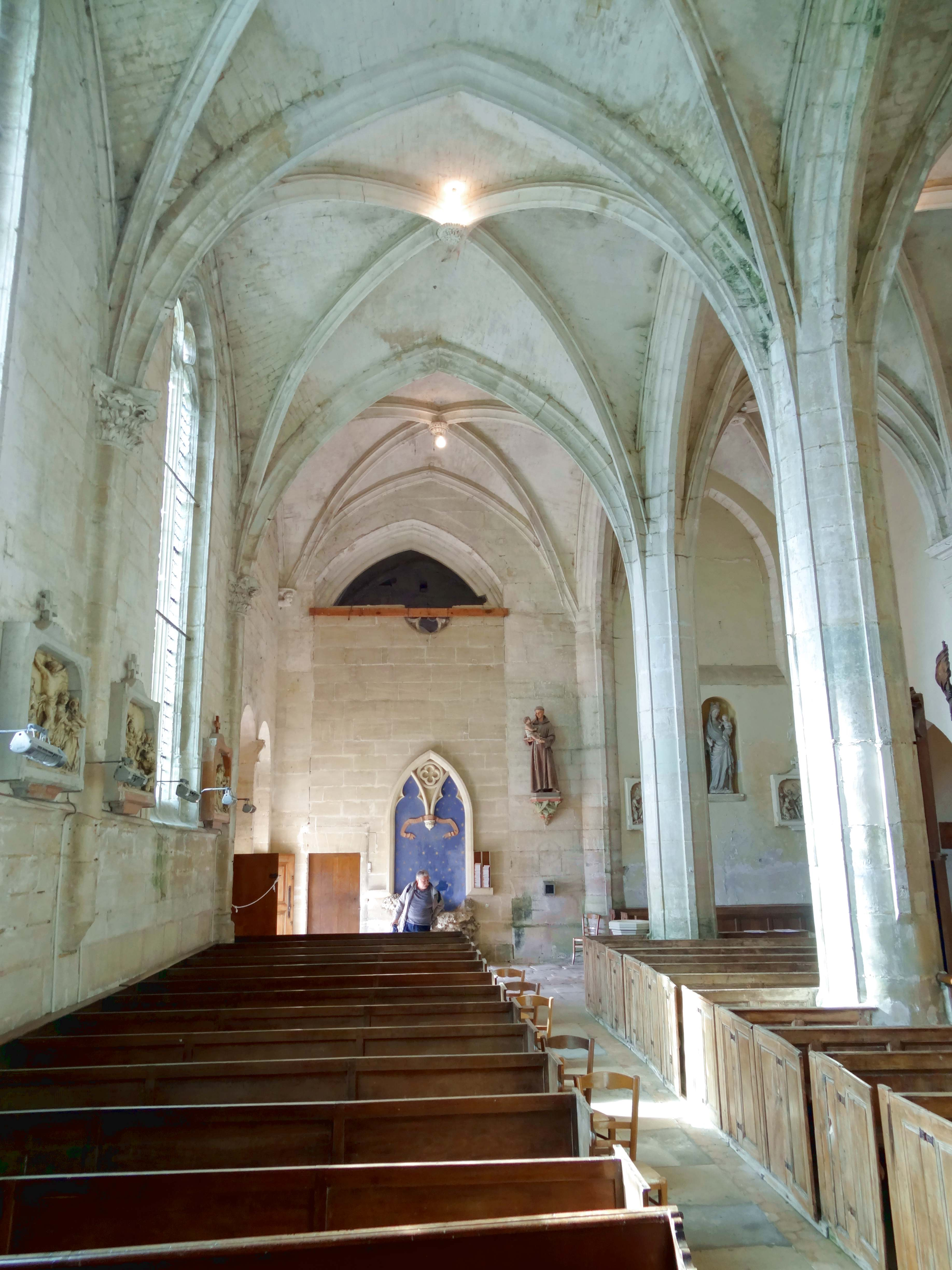 Intérieur de l'église - voir titre.